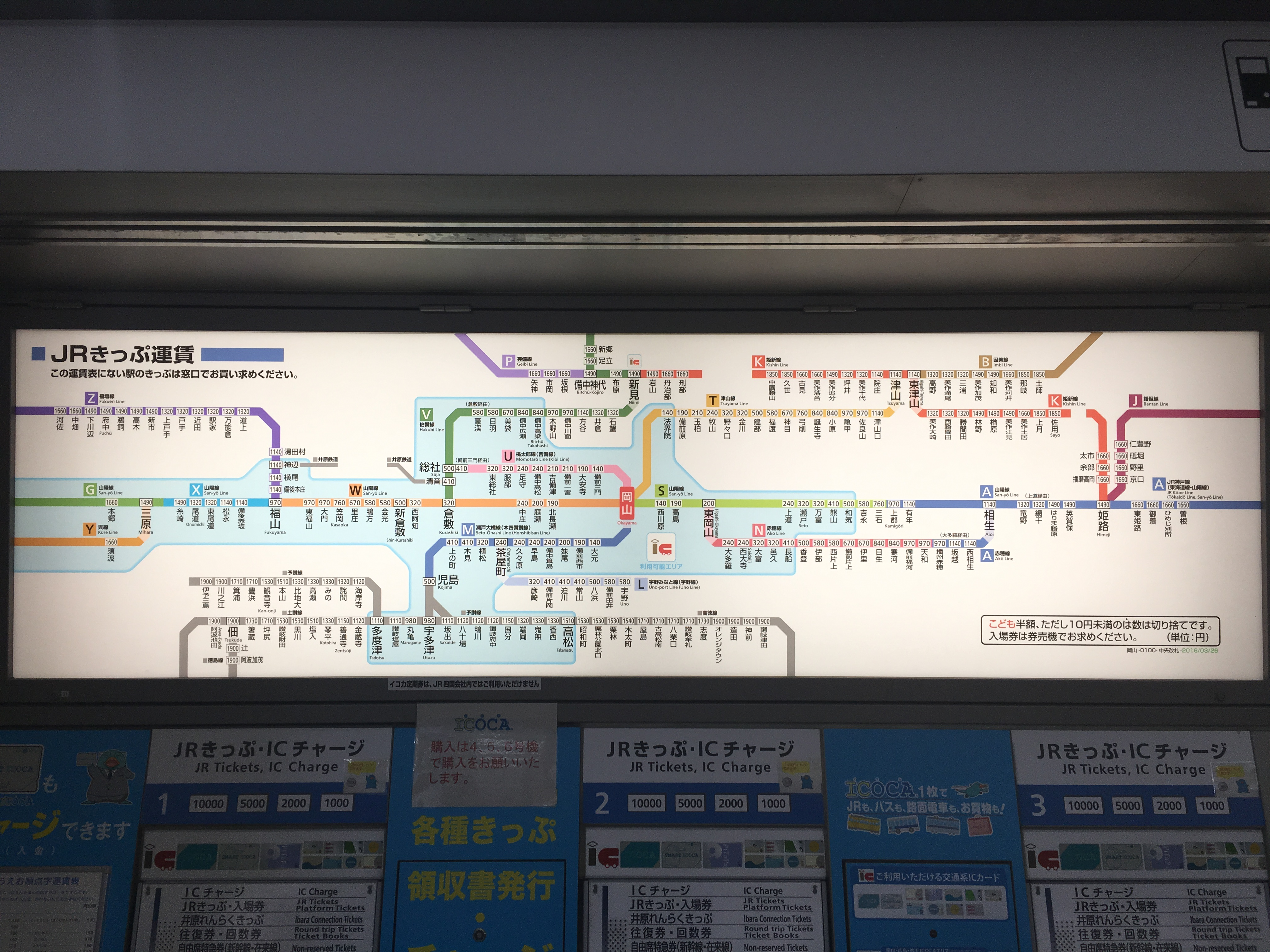 投稿者本人が撮影。路線記号導入ならびに東姫路駅開業に伴い更新された時点の岡山駅の運賃表